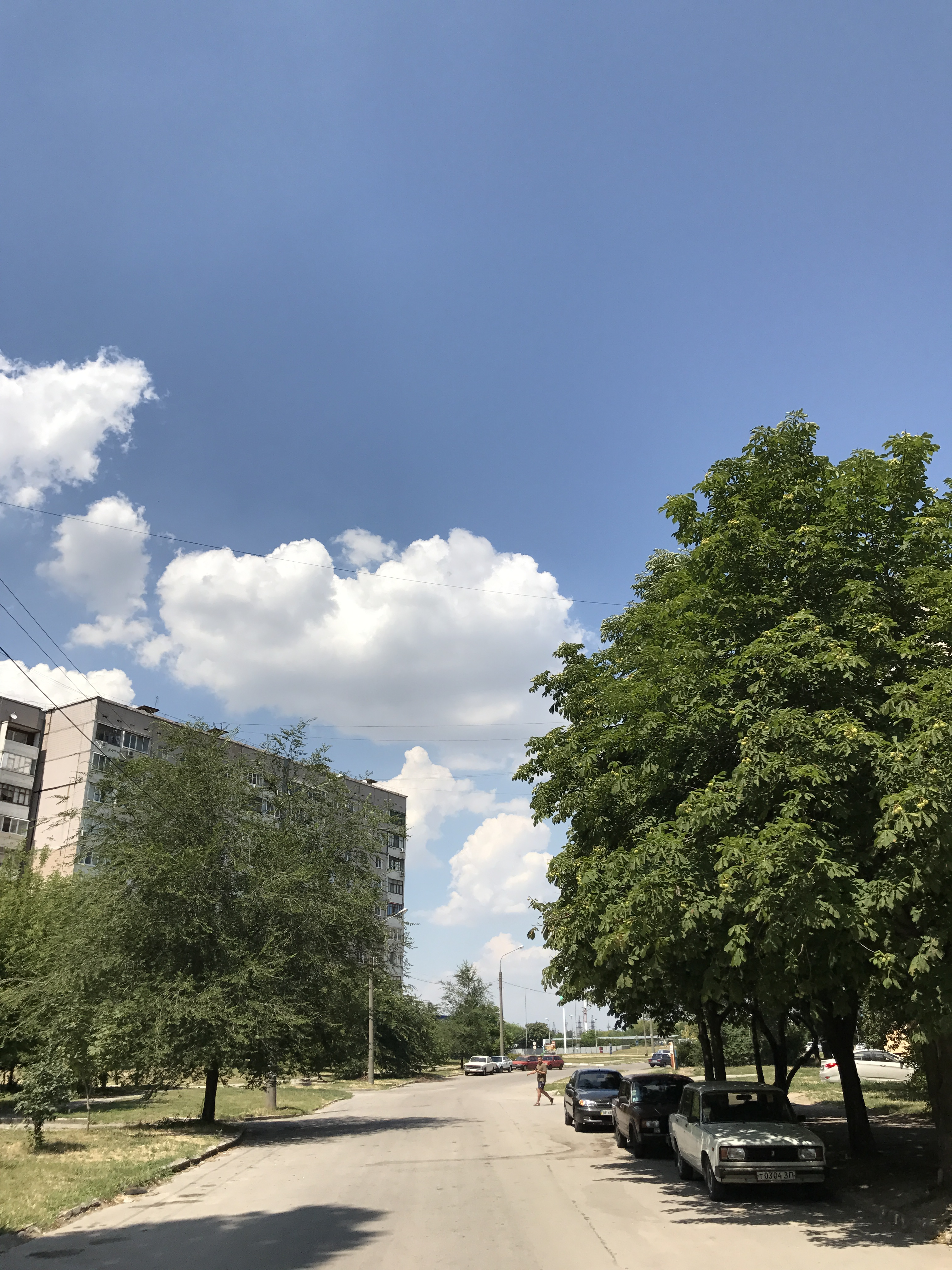 Фрагмент вулиця Козака Бабури в Хортицькому районі міста Запоріжжя